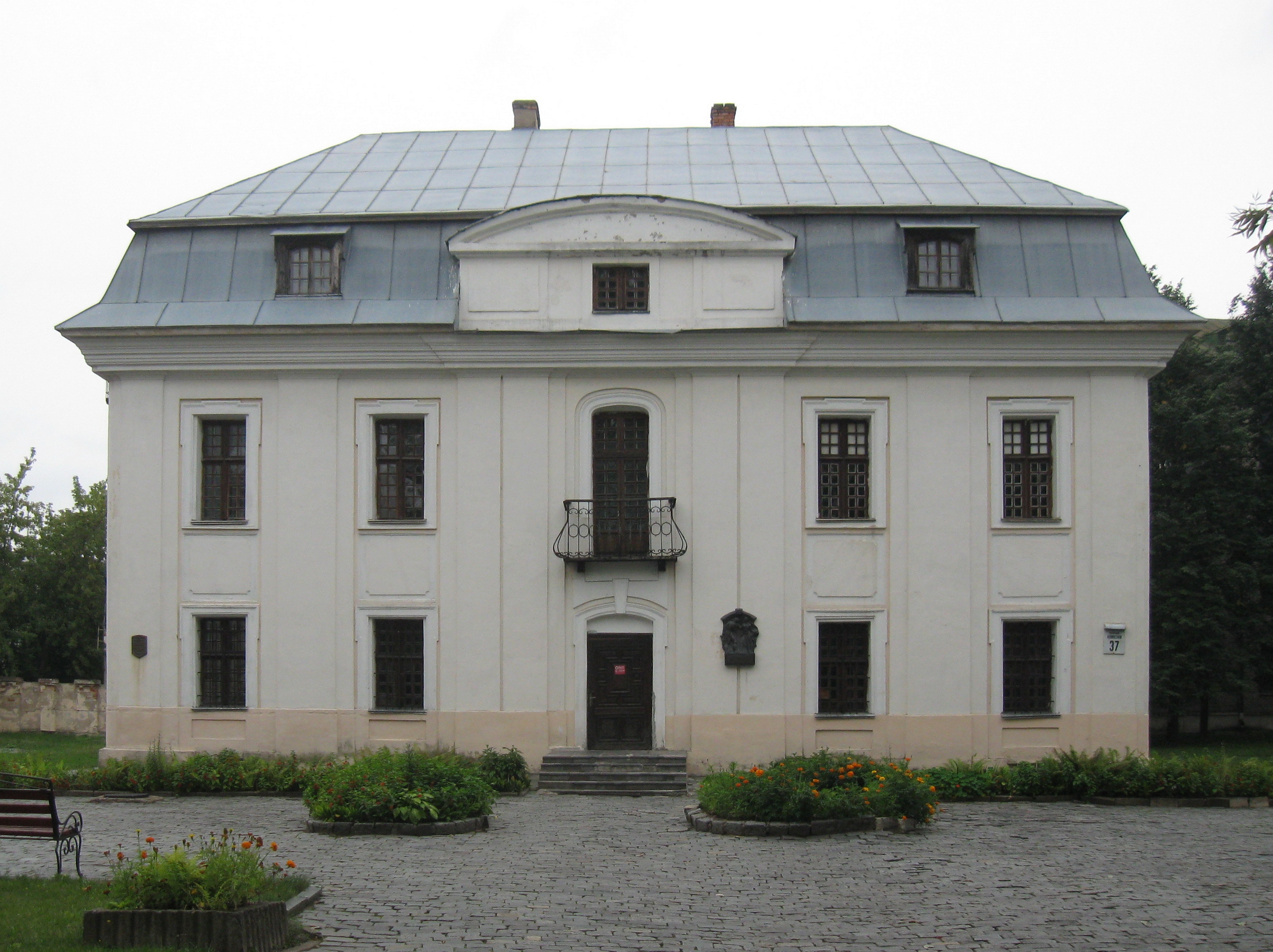 Беларуская (тарашкевіца): Былы дом купца Анташкевіча. г. Магілёў This is a photo of Belarusian heritage monument. Reference number: 512Г000026 ( WLM)